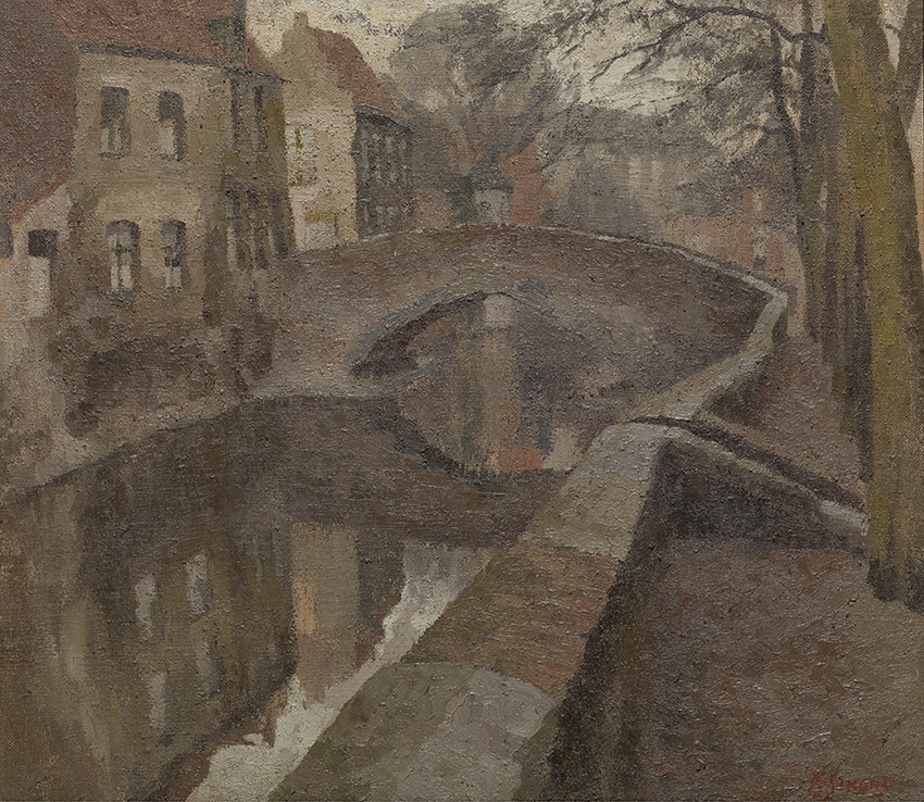 De Peerdenbrug in Brugge (Karel Simons, circa 1903 - circa 1927); collection: Musea Brugge - Groeningemuseum